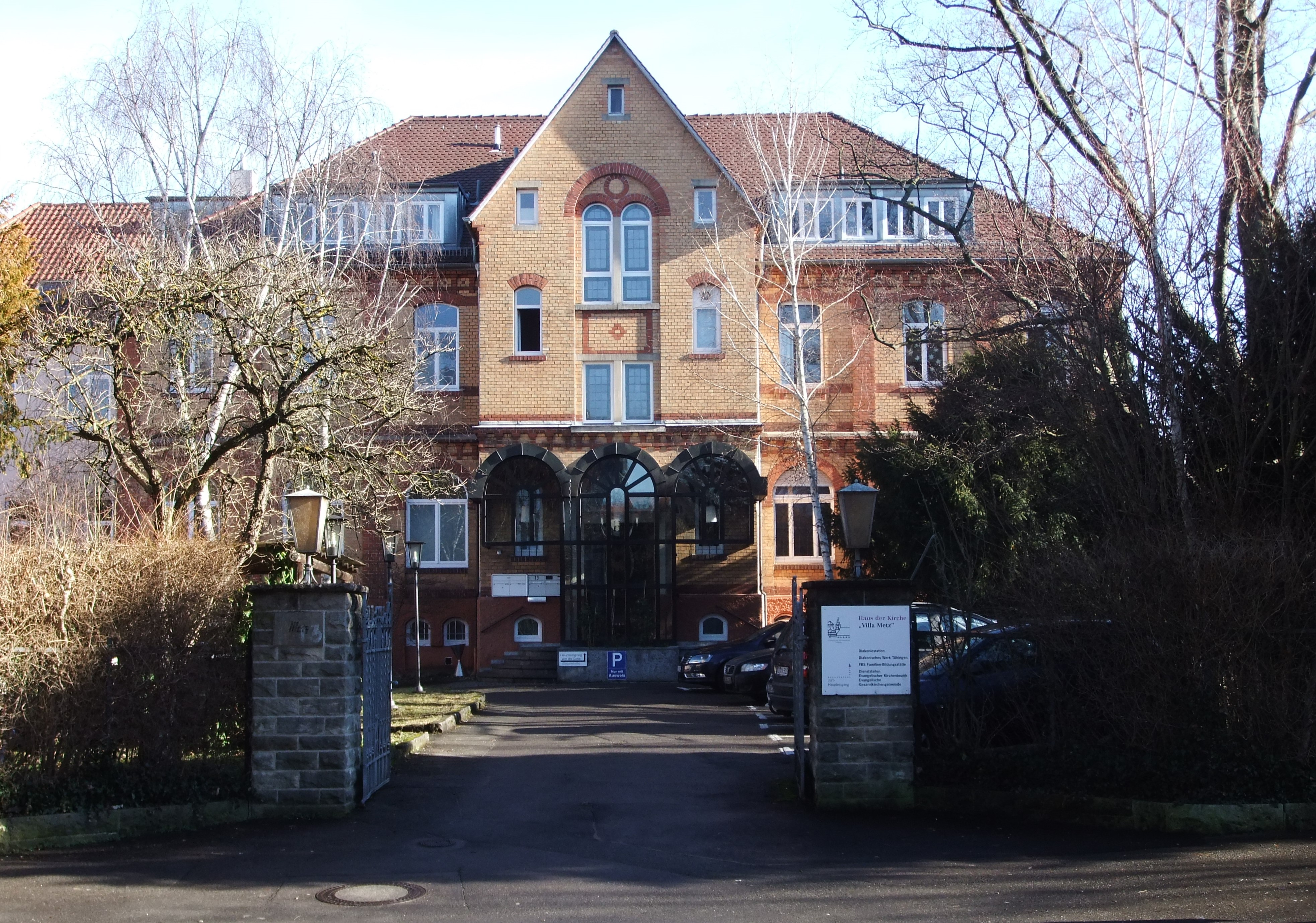 Tübingen. Villa Metz, Hechinger Straße 13, ehemaliger Sitz des Verlags Gebrüder Metz, heute Familienbildungsstelle der Evangelischen Kirche in Württemberg.